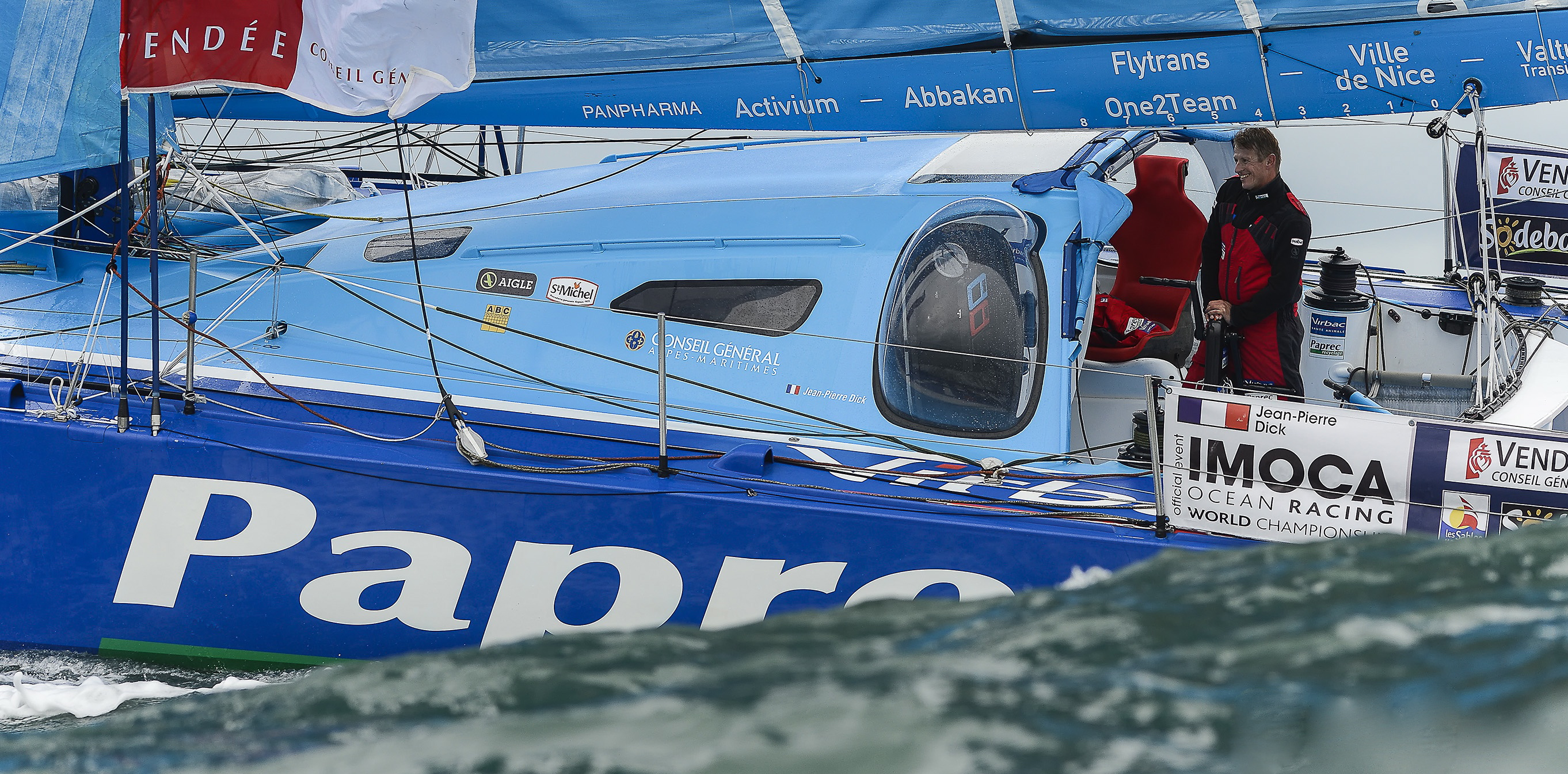 0714-Vendée 2012 (Départ)